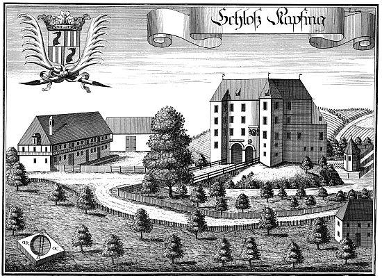 Schloss Kapfing; Kupferstich von Michael Wening. In: Historico-Topographica Descriptio [...] Dritter Theil. München: Johann Lucas Straub 1723. 25,7 x 34,7 cm.